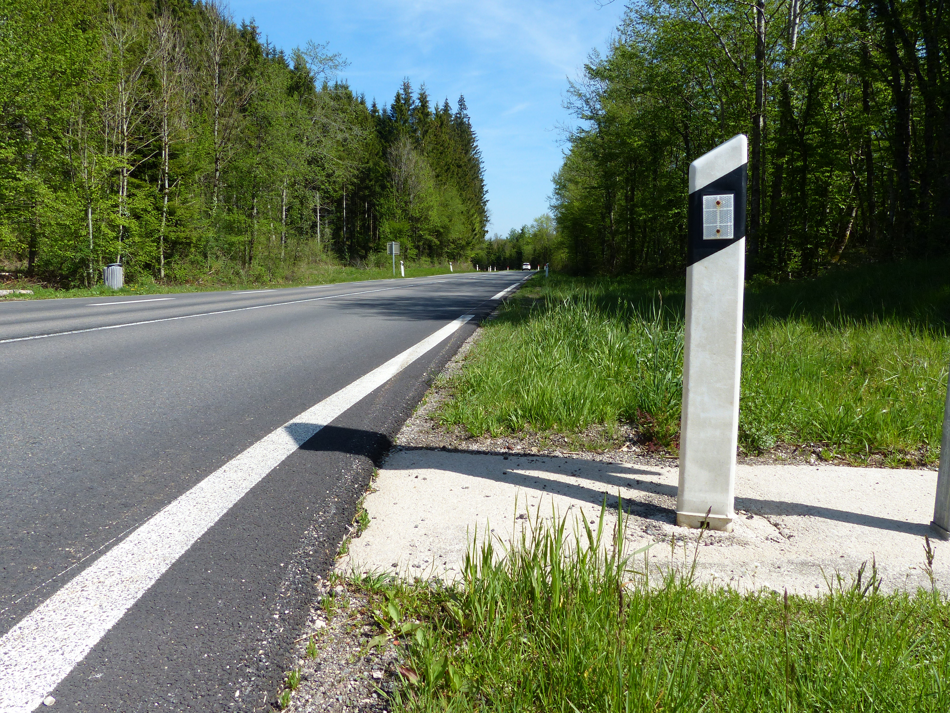 Balise J6 côté droit, N5, Le Vaudioux, Jura, France.